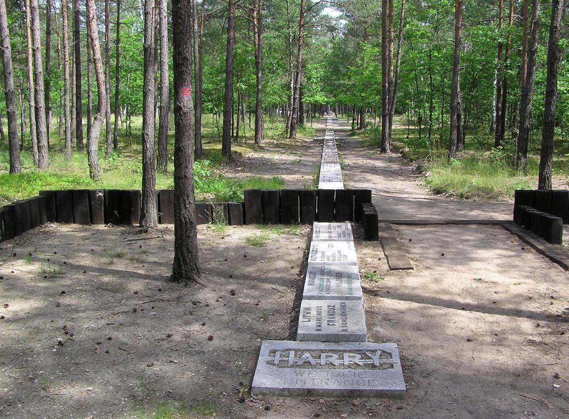 Stalag Luft III, Harry Tunnel